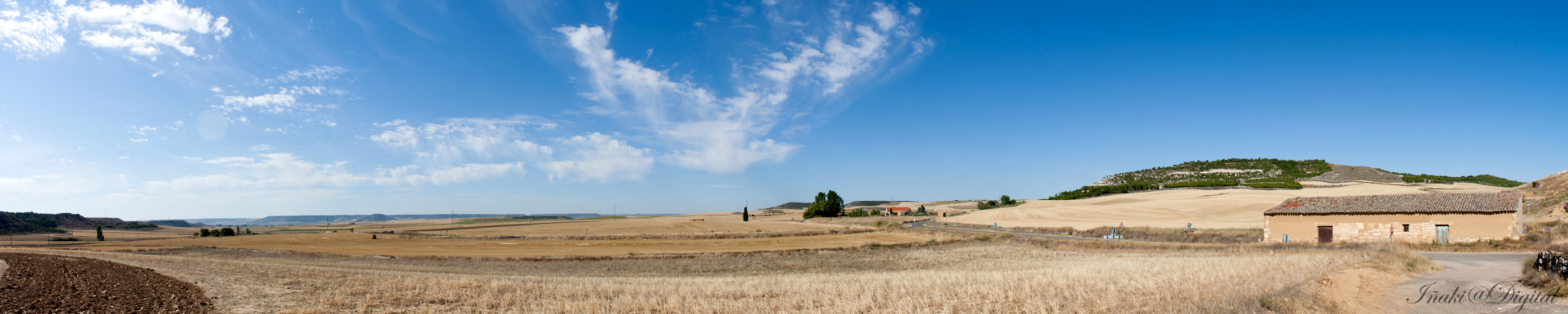 Entrada al pueblo de Valdeolmillos en la provincia de Palencia. Sentado en la zona conocida por "Las Escuelas" te relajas mirando el horizonte y escuchando el silencio de Castilla en un caluroso mes de Agosto. A la zona del fondo a la izquierda se conoce por la zona "Las Marraneras", en la zona central esta las "Eras camino de Palencia" y se ve la carretera que nos lleva a la capital. En la zona de la derecha se ve una antigua caseta usada para guardar utiles de lambranza.